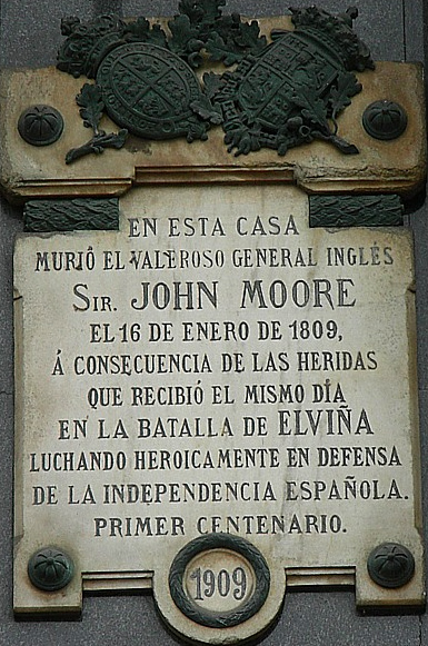 Placa conmemorativa en la ciudad vieja coruñesa